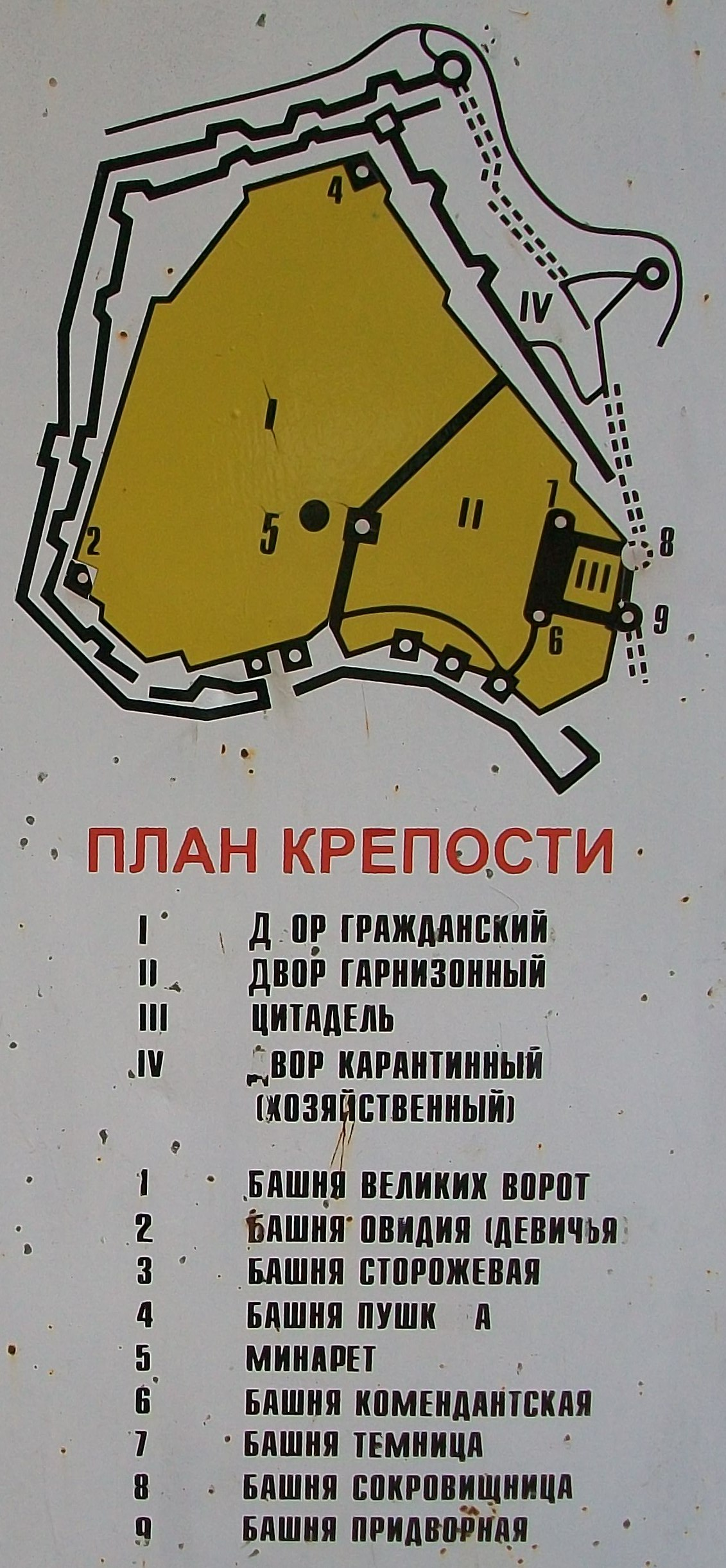 План Аккерманської фортеці